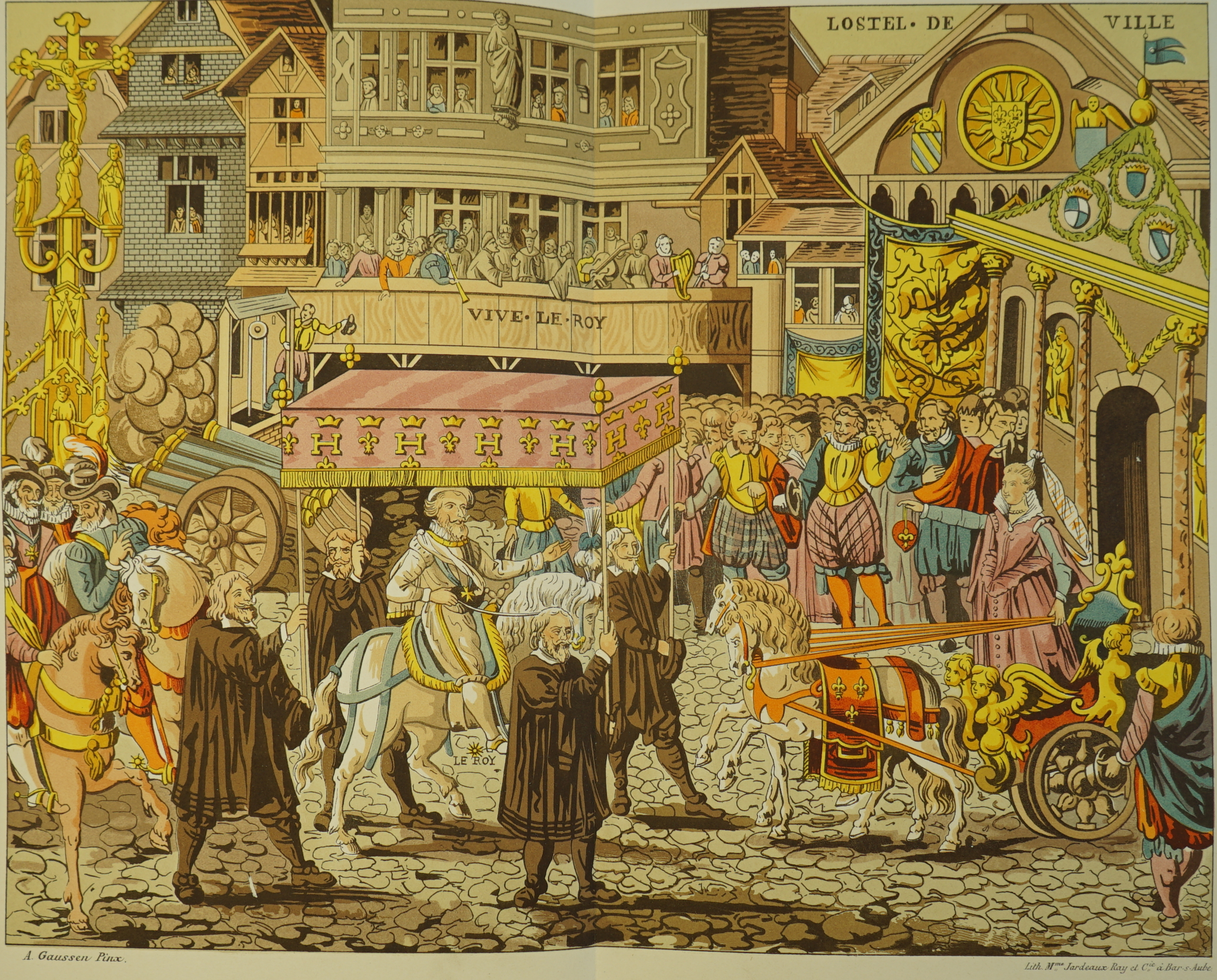 dessin du vitrail de l'antrée d'Heni IV à troyes. présenté au musée Vauluisant de Troyes.